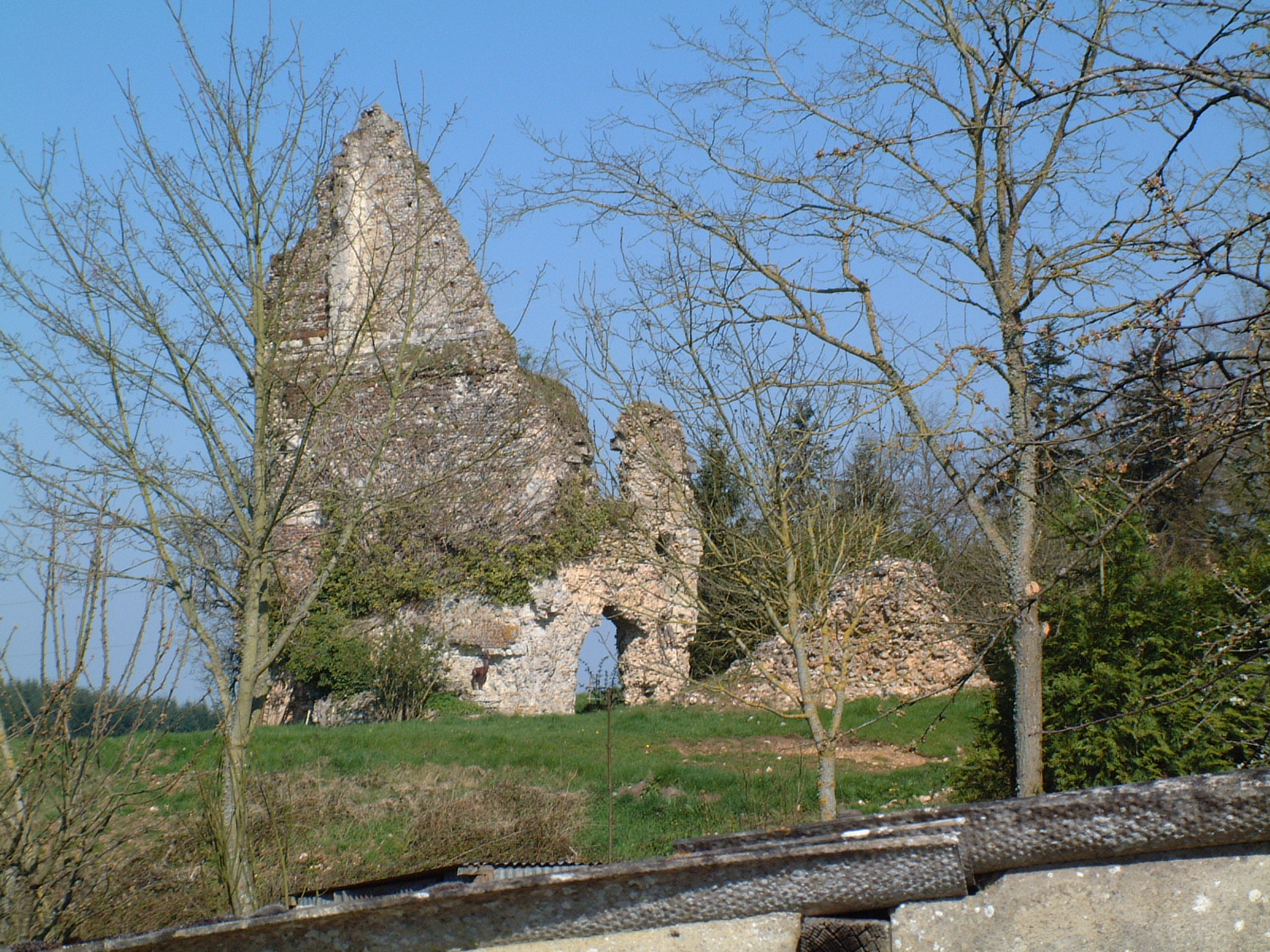 Ruines du chateau de Bonsmoulins